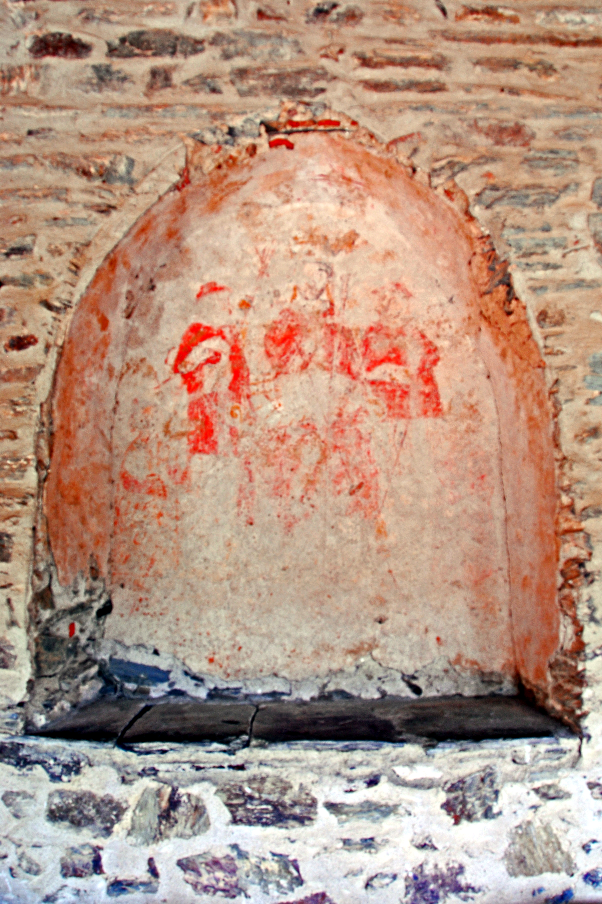 Serrabone, Kreuzgang, Nische mit Fresko